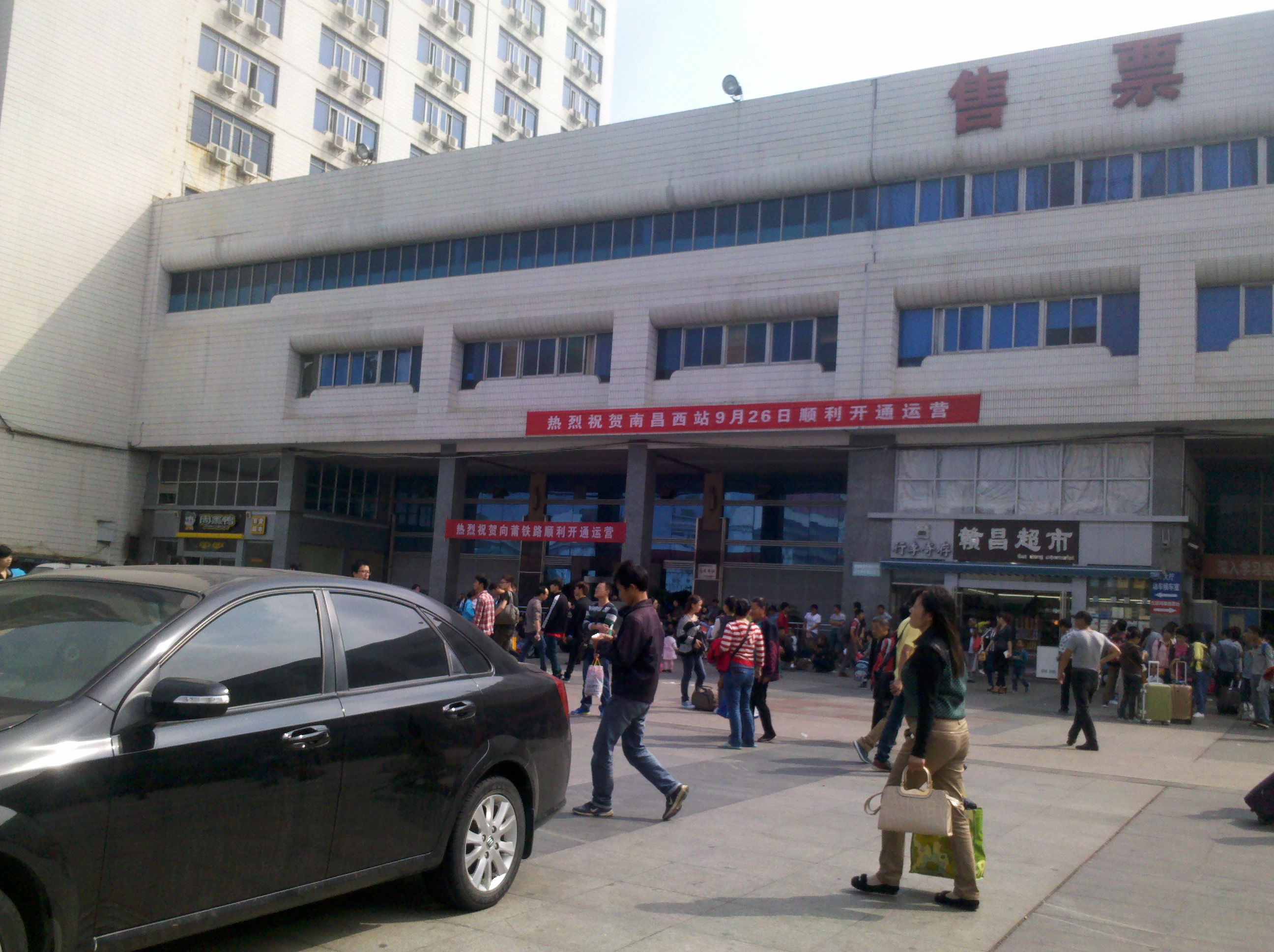 南昌站庆祝向莆铁路开通以及南昌西站启用的横幅